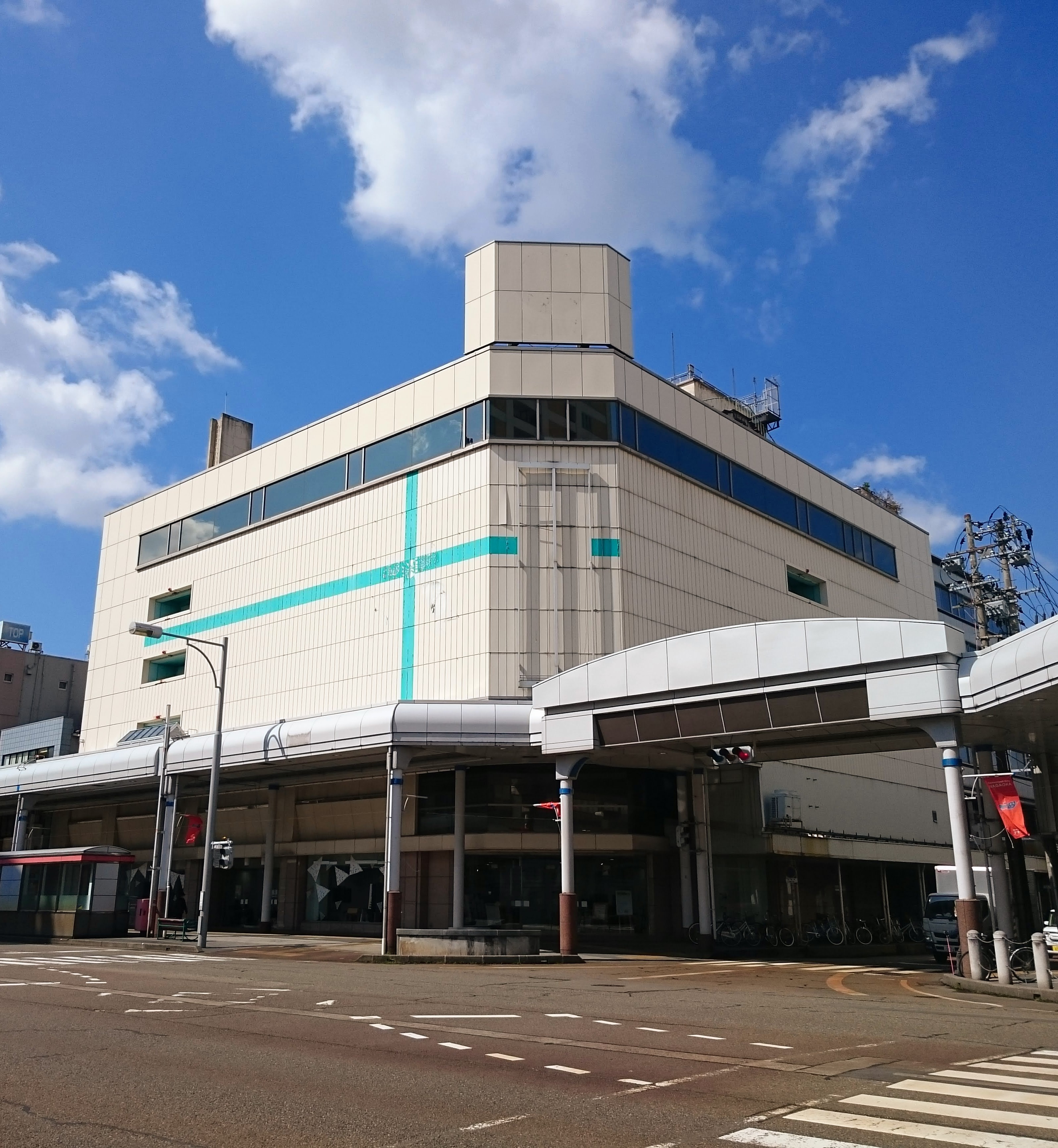 NaDeC Baseの建物外観